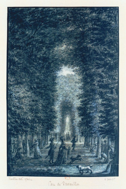 Parc de Versailles. Vue d'une allée, 1746, dessin de Norblin de La Gourdaine, Jean Pierre